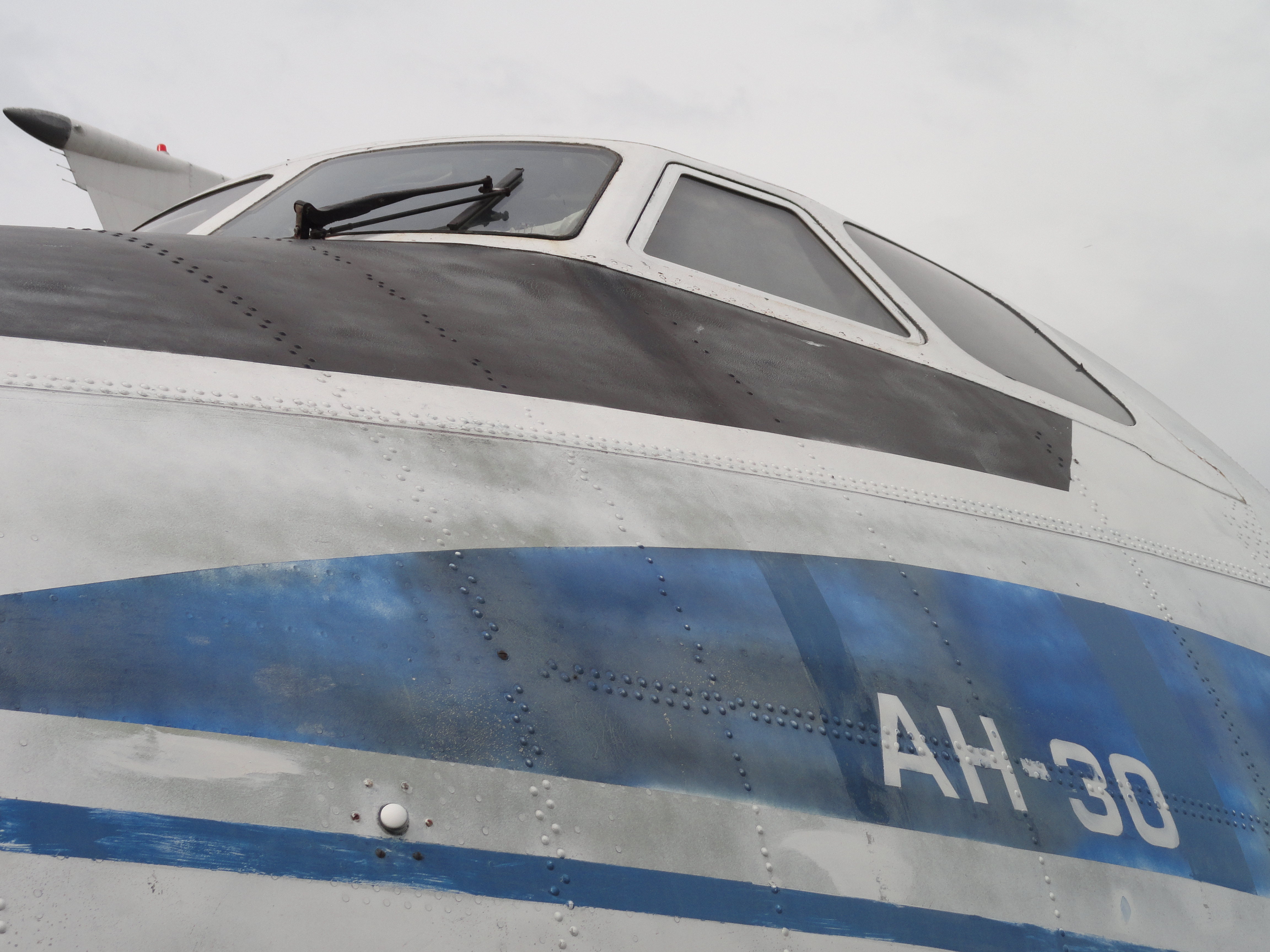 Стеклоочиститель на лобовом стекле кабины самолёта Ан-30. Фото сделано в Государственном Авиационном музее авиации в Киеве.